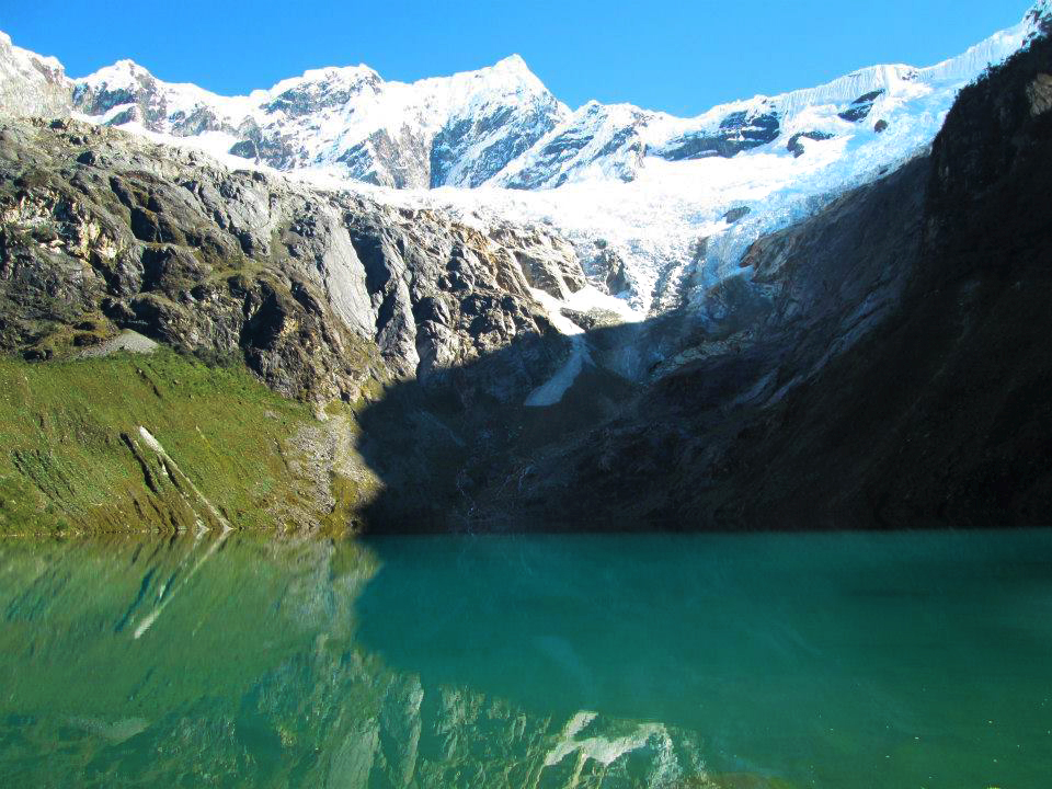 Laguna Yanarraju - Distrito de Chacas - Provincia de Asunción - Áncash - Perú